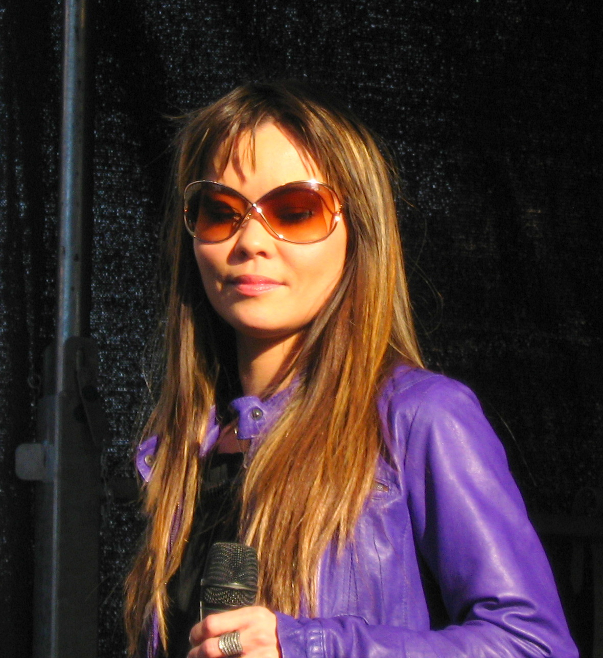 Christina Chanée i Hjørring